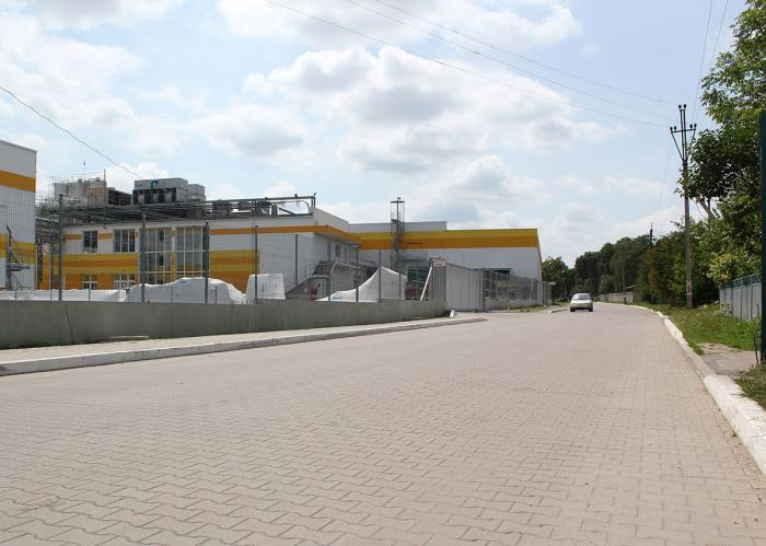 Ильинцы,улица Михаила Коцюбинского.Завод Люстдорф